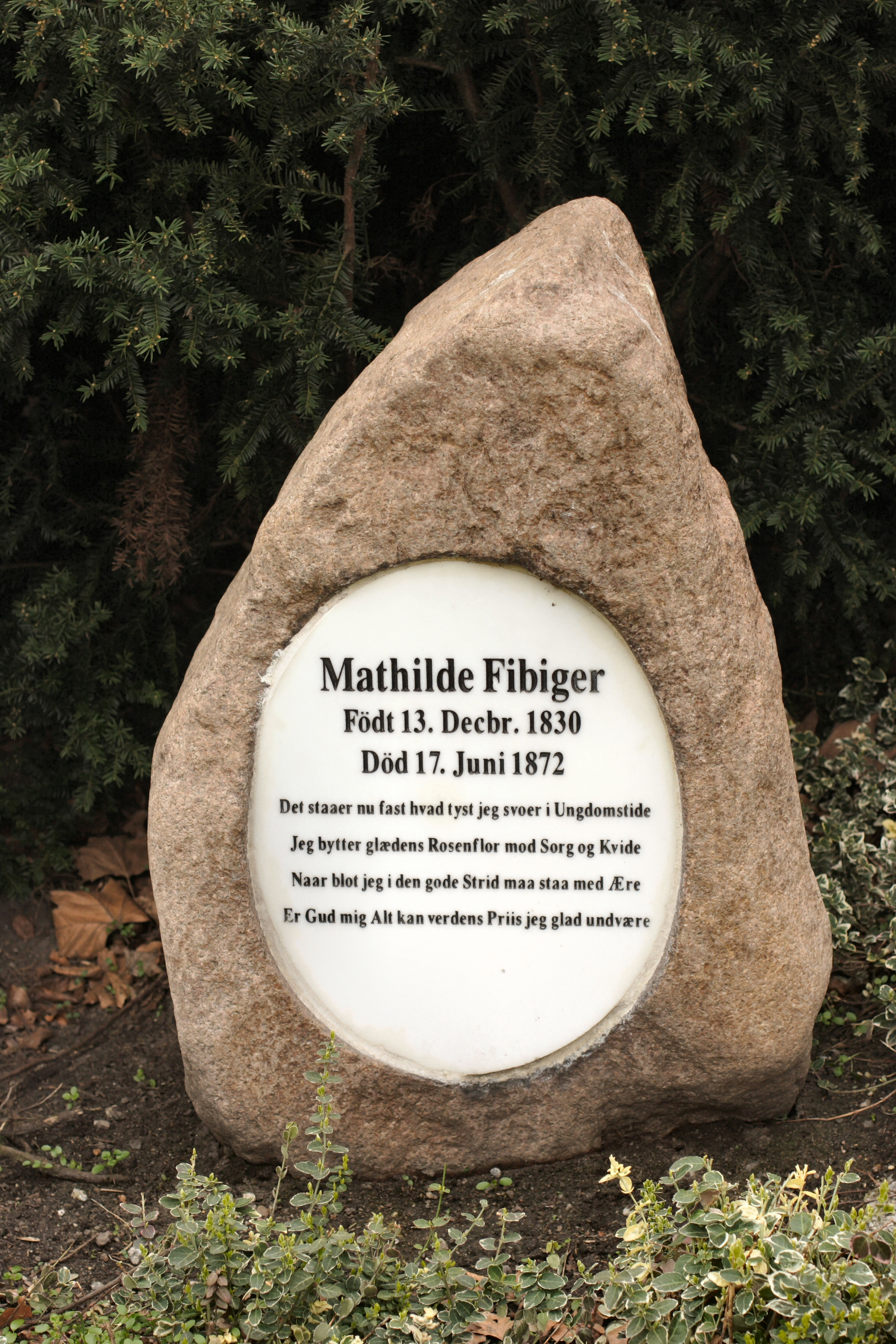 Mathilde Fibigers gravsten i Århus Rådhusparks lapidarium